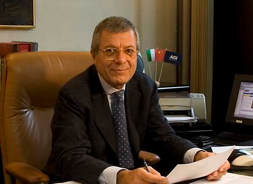 Giuliano De Risi Premio Ischia 2008